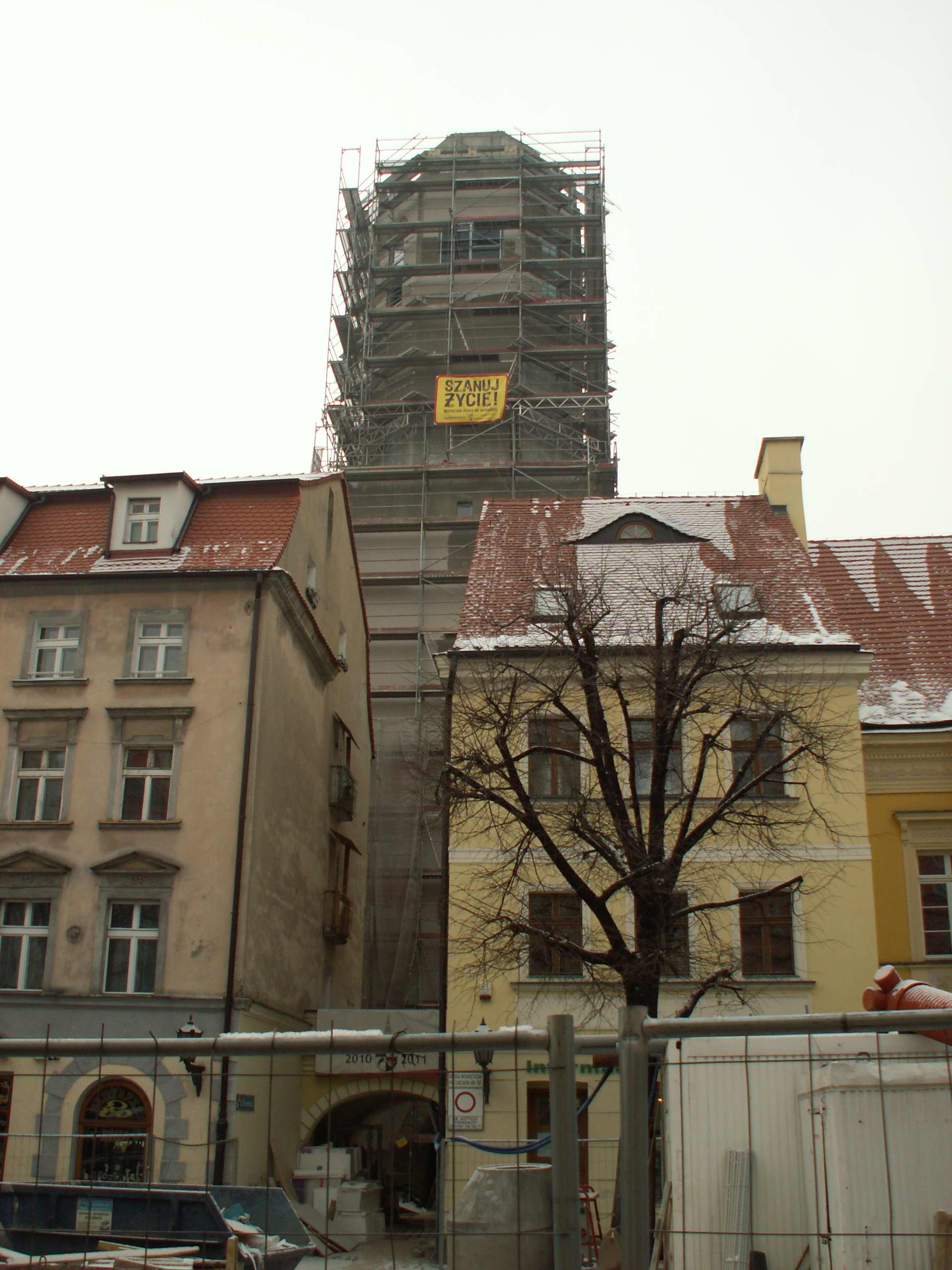 Odbudowa wieży - 5.02.2012